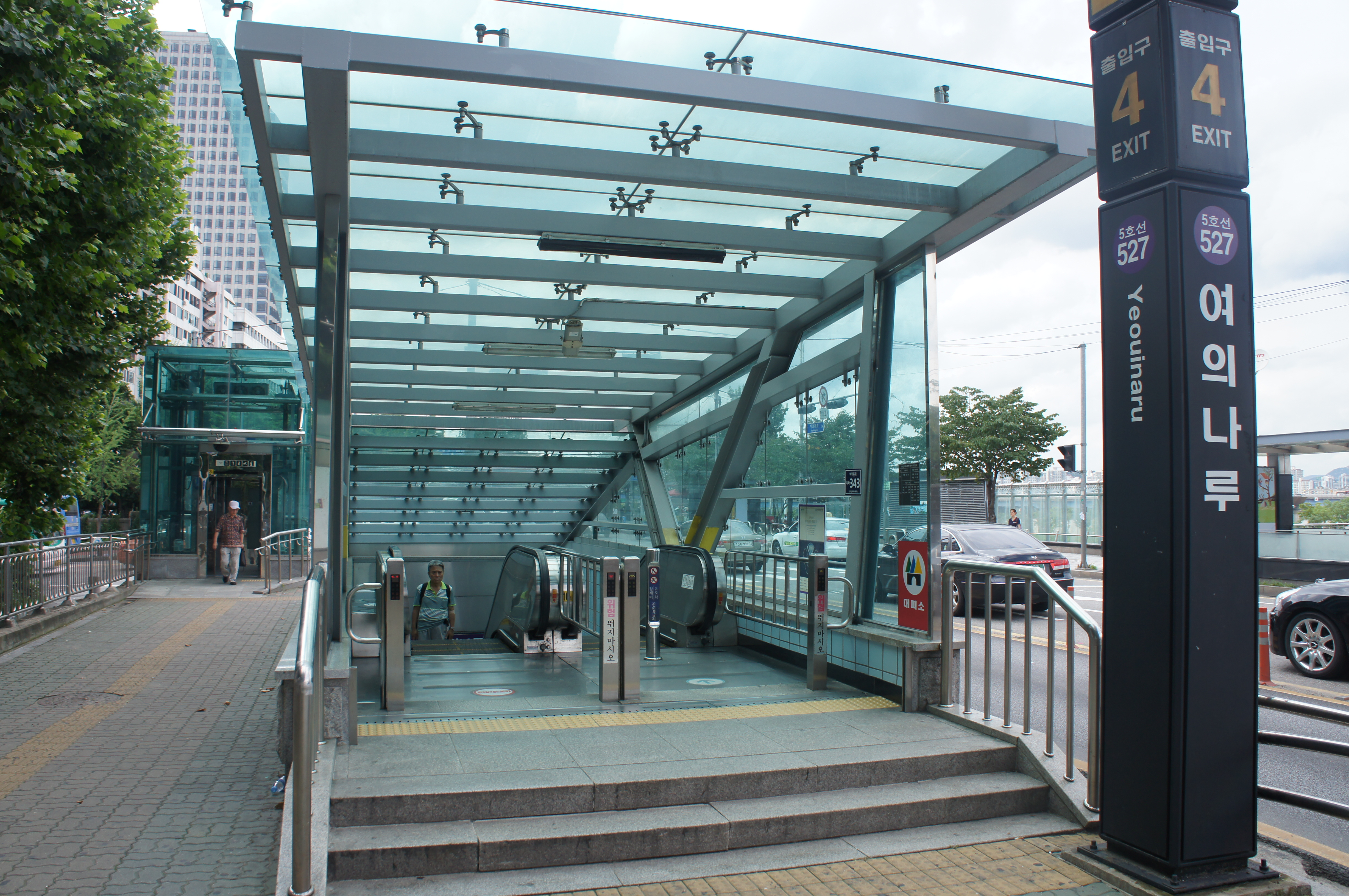 여의나루역 4번 출입구